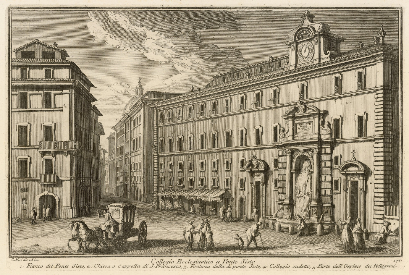 La "fontana dei Cento Preti" nella sua collocazione originaria, in una incisione di G.Vasi (1759)